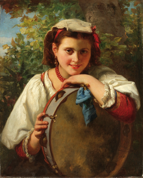 Mädchen mit Tambourin